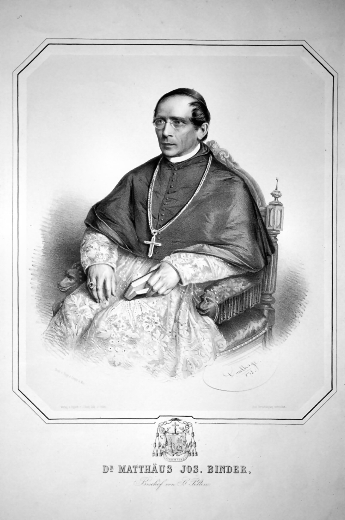 Matthäus Josef Binder (1822-1893) Dr. tholog., Bischof von St.Pölten. Lithographie von Adolf Dauthage, 1873